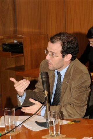 Diputado Juan Manuel Garino